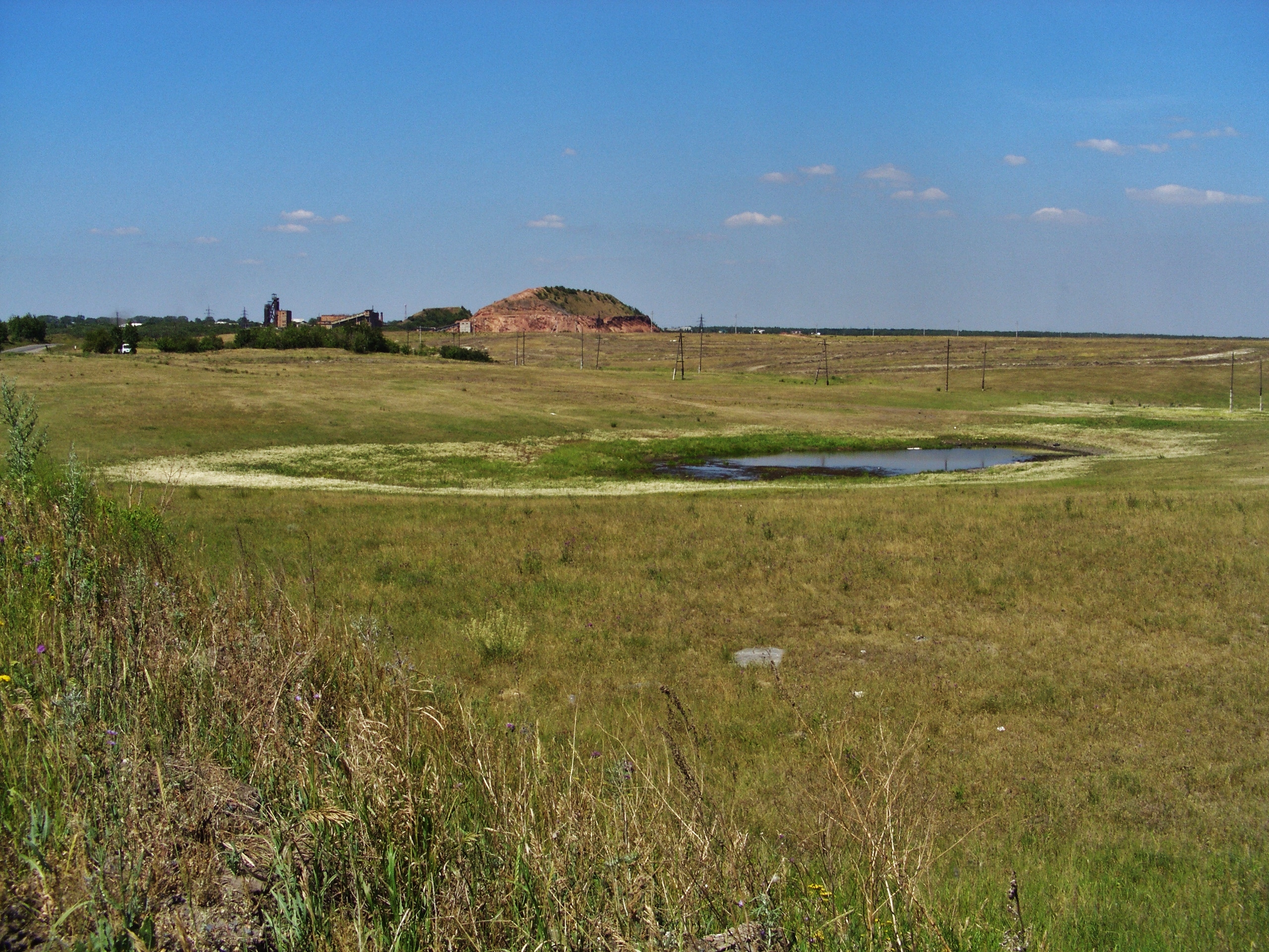 Kopeysk, Chelyabinsk Oblast, Russia